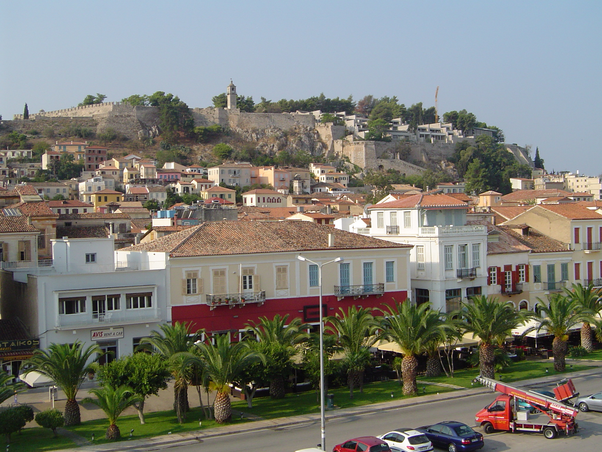 Stad a Buerg vu Nafplio Source: Eege Foto (2005) vum ernmuhl Lizenz